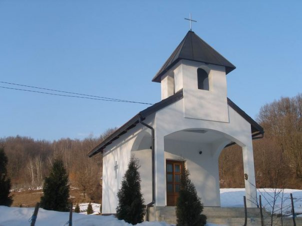 Kapela Sv. Jurja na Brajak Brdu, Netretić, Karlovačka županija